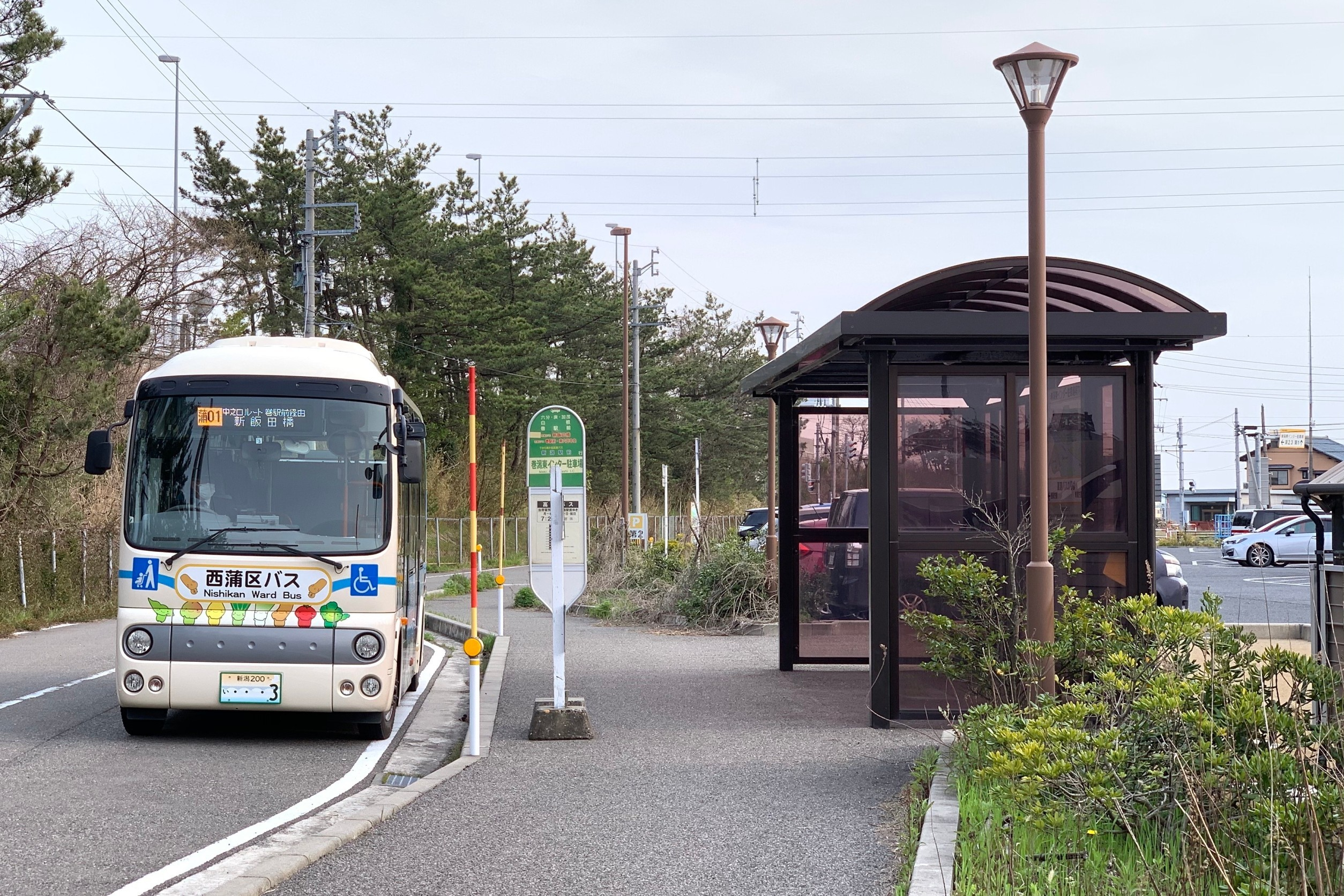 北陸自動車道・巻潟東バスストップ脇の無料パークアンドライド駐車場に停車する西蒲区区バス（2020年4月）